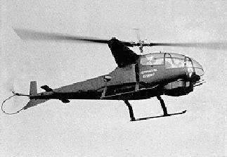 Da it::en:Image:Bell207.jpg Immagine proveninete dal sito [1] Sito governativo americano